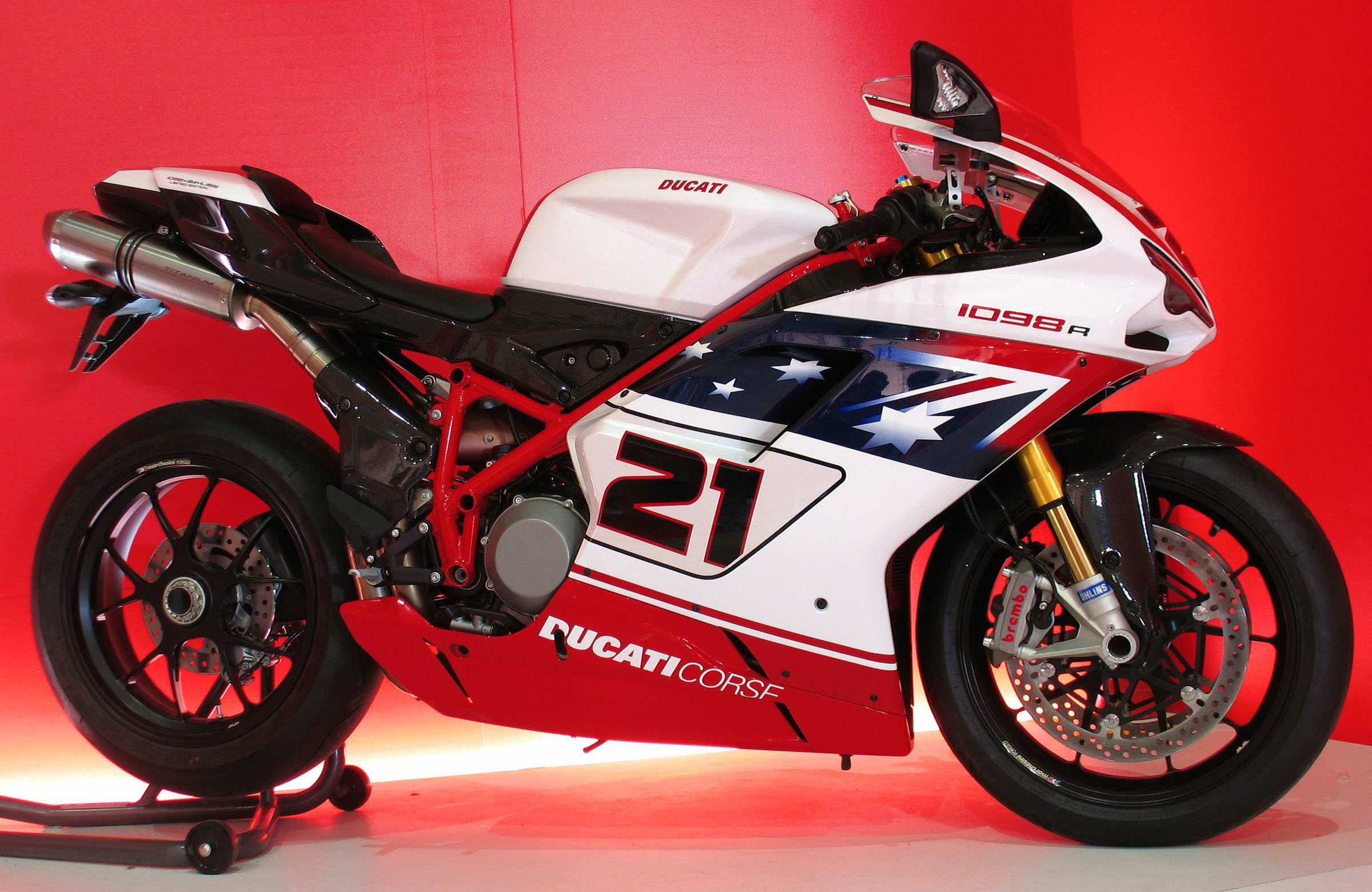 ducati bayliss limited